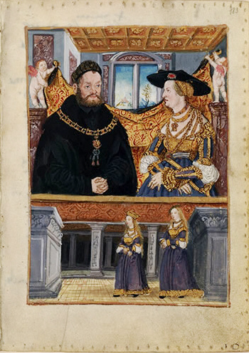 Portrait From: Gebetbuch der Markgräfin von Brandenburg, 1520 Manuscript in the Badische Landesbibliothek, Karlsruhe, Germany Codex Durlach 2